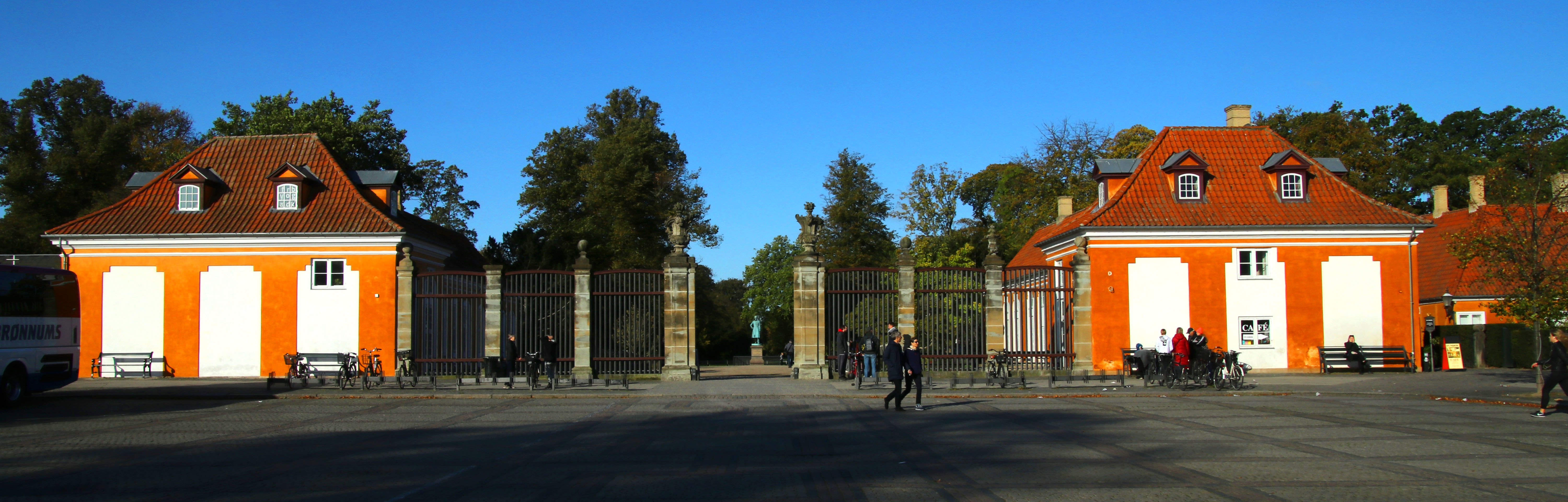 The main entrance to Frederiksberg Gardens in Copenhagen, Denmark